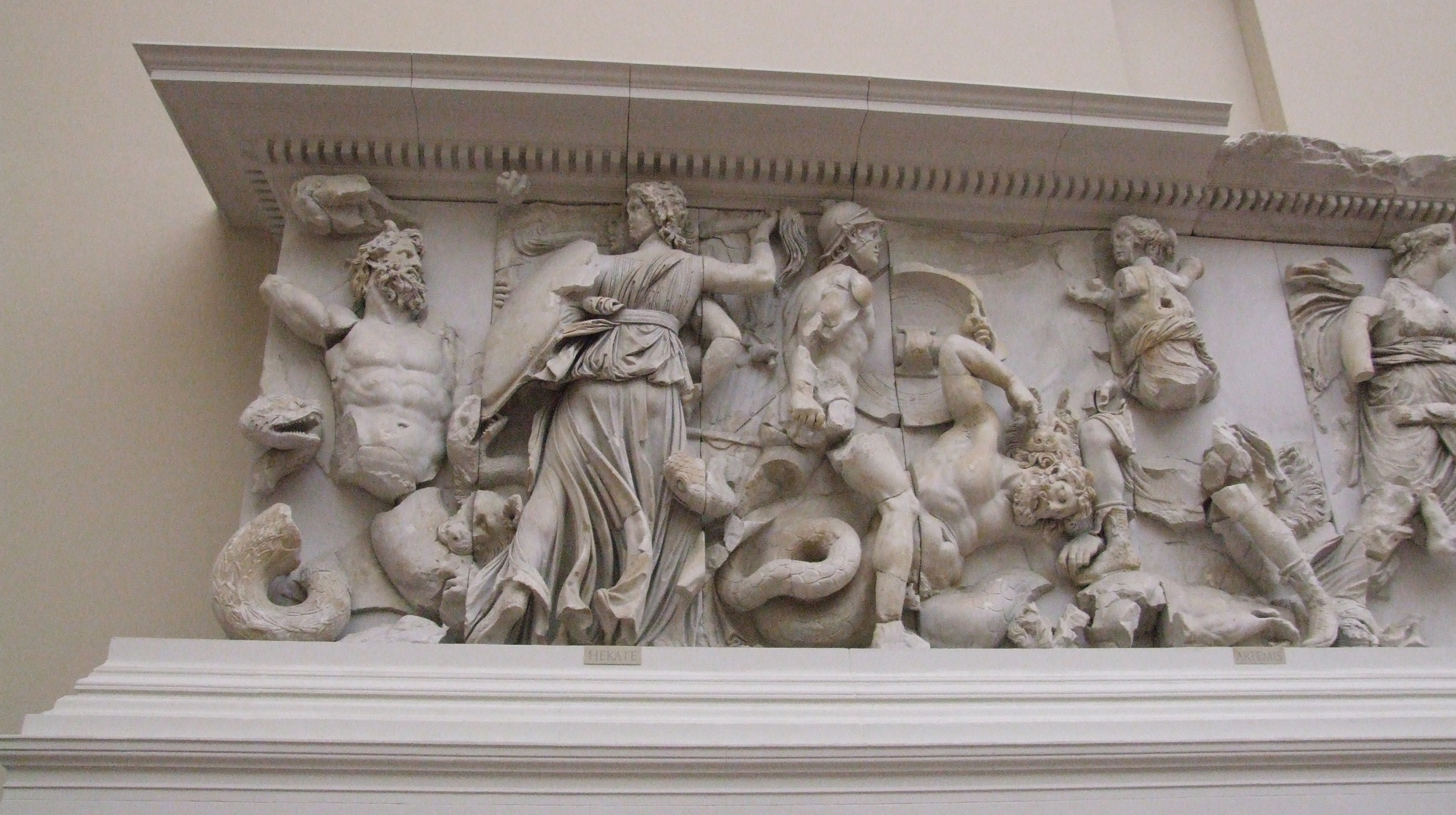 Pergamonmuseum Berlin: Pergamonaltar, Gigantomachie, Hektate verbrennt Kytios mit der Höllenfackel, Hektate burns Klytios